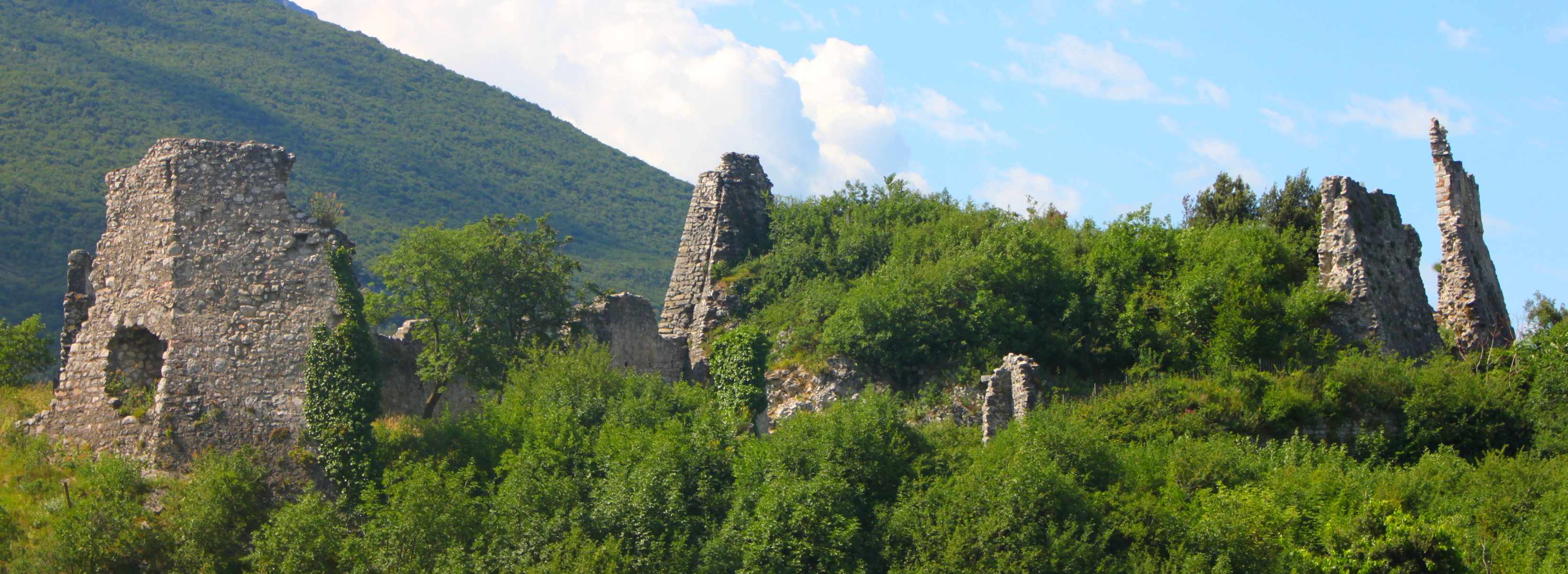 Das Castel Penede ist eine Ruine, auf dem Felsen über Torbole.